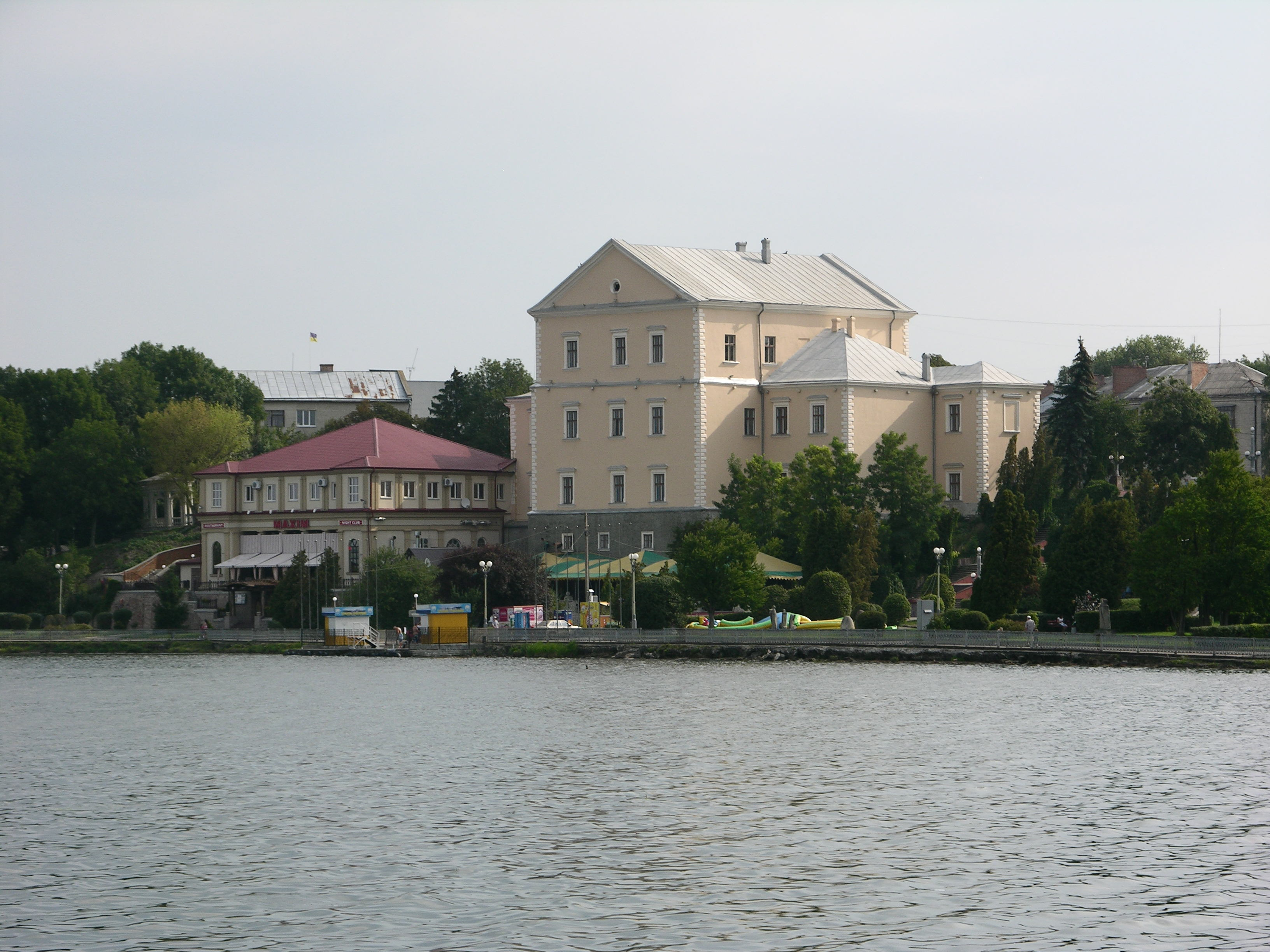 Зліва: пам'ятка архітектури місцевого значення на вул. Білецькій, 1А в Тернополі — колишній житловий будинок (у радянський час — будівля бару «Каскад»), нині — розважальний комплекс «Максим» (пам'ятка — перший поверх комплексу). Справа: пам'ятка архітектури національного значення — Старий замок, вул. Замкова, 12.